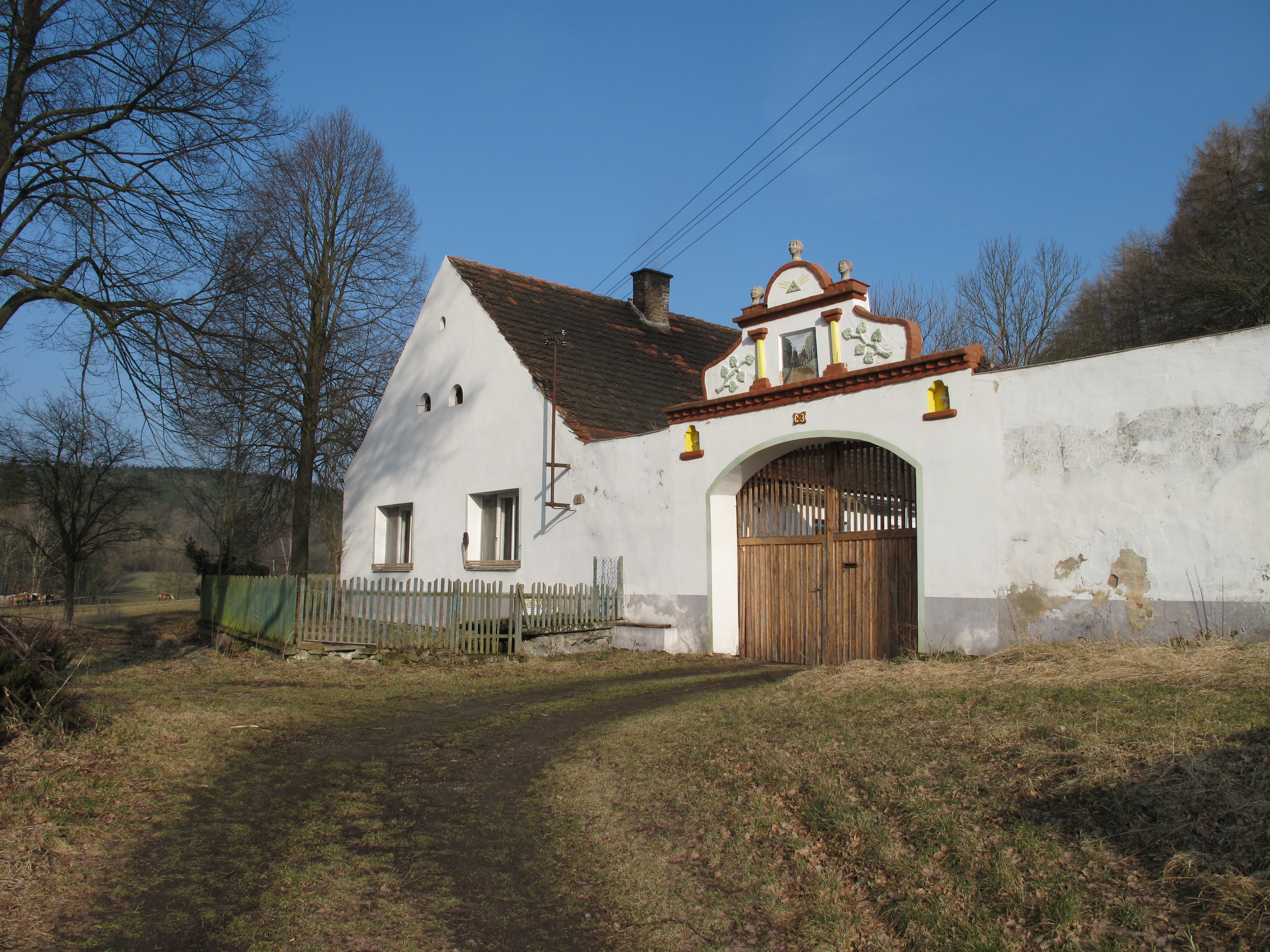 Statek ve Straňovicích. Okres Strakonice, Česká republika.